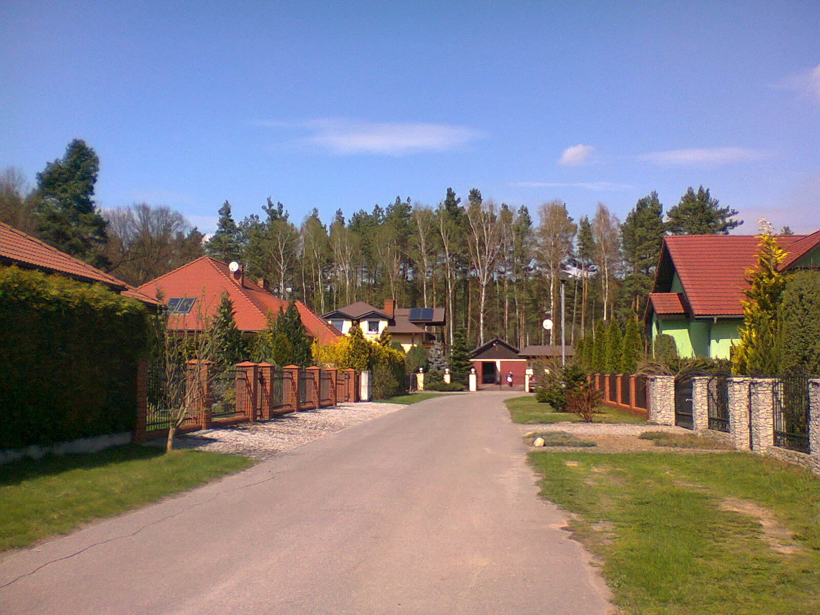 Marszów ul. Leśna